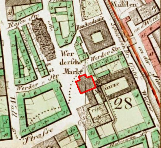 Lageplan der Berliner Alten Münze am Werderschen Markt, 1846.